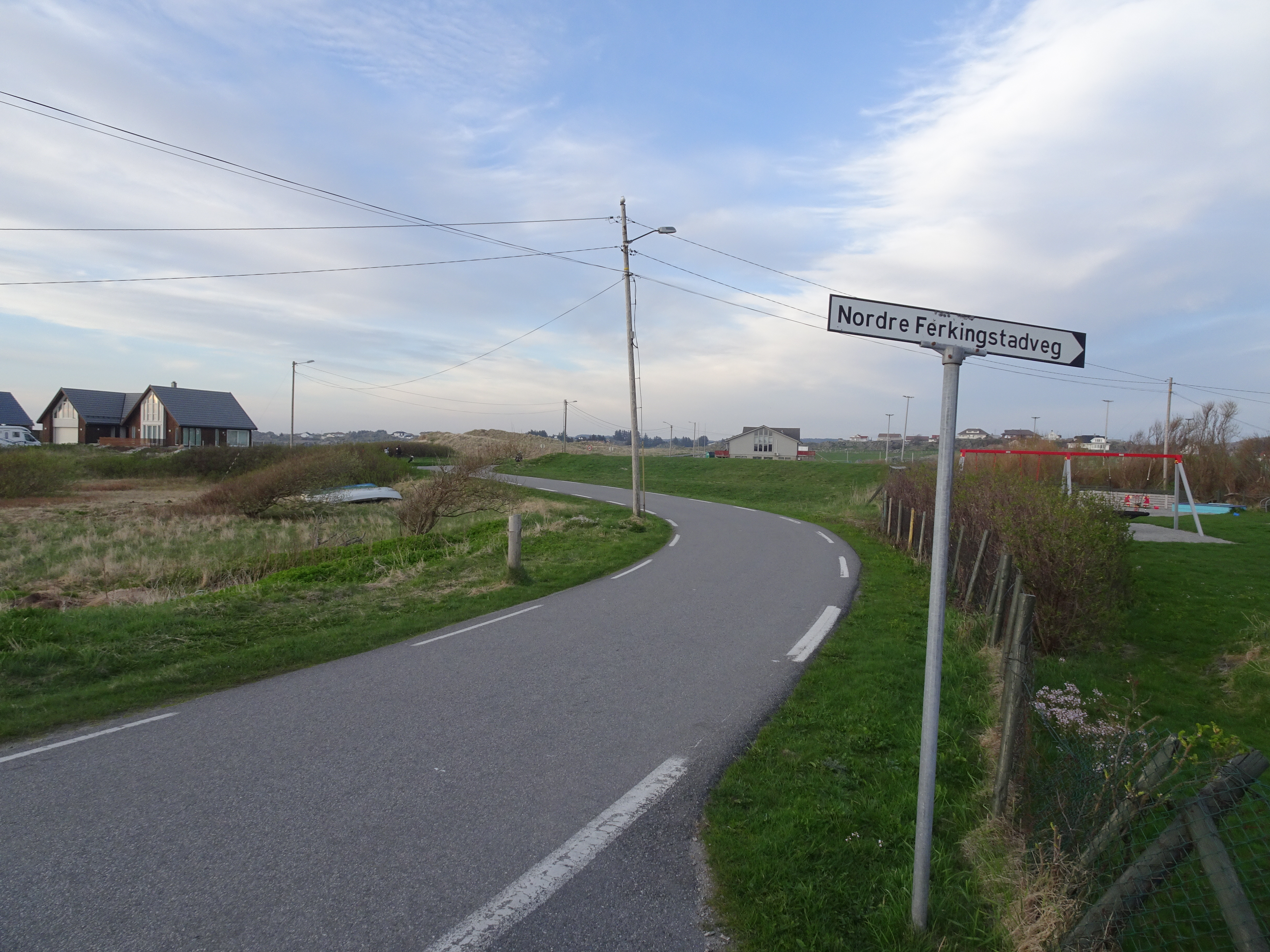 Stavavegen (fylkesvei 858) ved Ferkingstad havn